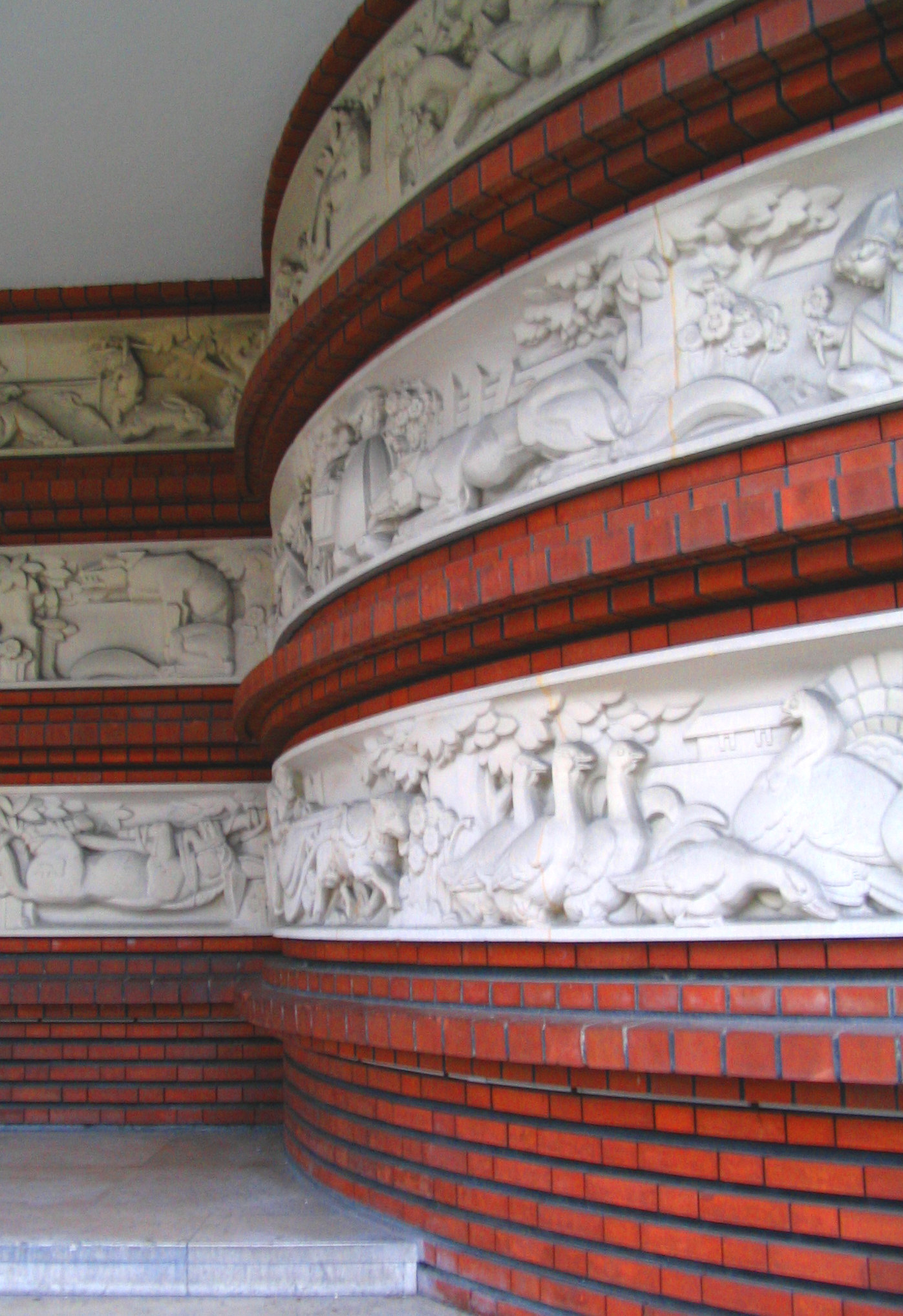 Groupe scolaire Jules Ferry - Maisons-Alfort - France 1932 - Entrée des élèves - Sculptures par Maurice Saulo Auteur/Author: P.Charpiat 2006